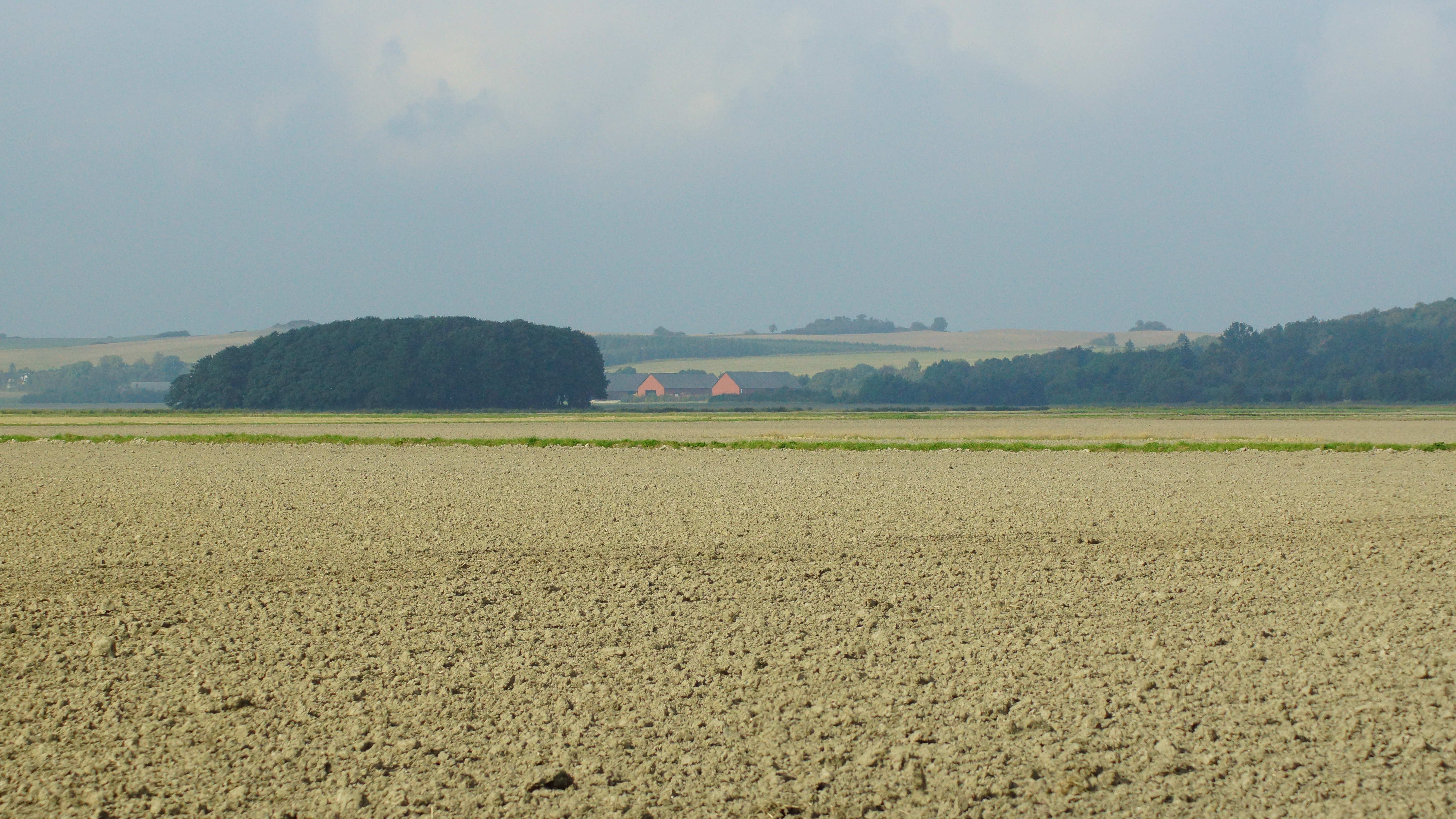 Det centrale Kolindsund